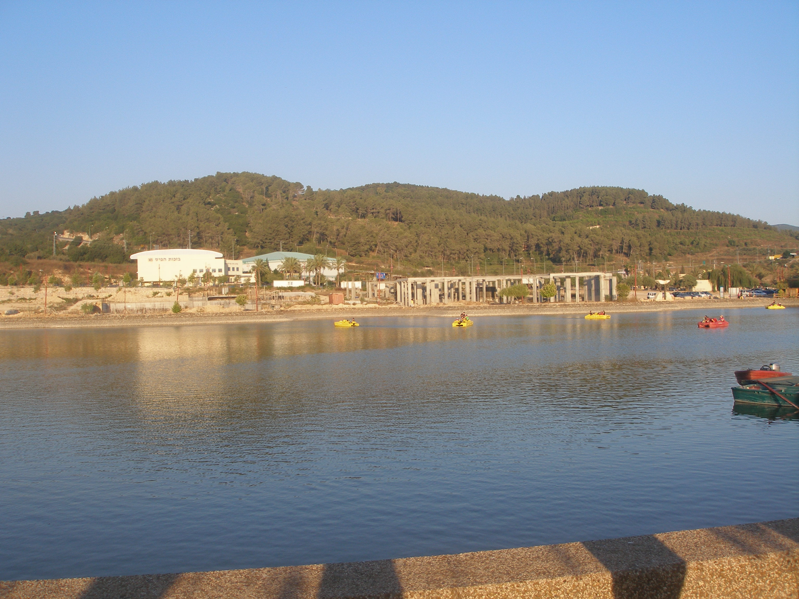 Maalot Tarshiha lake.